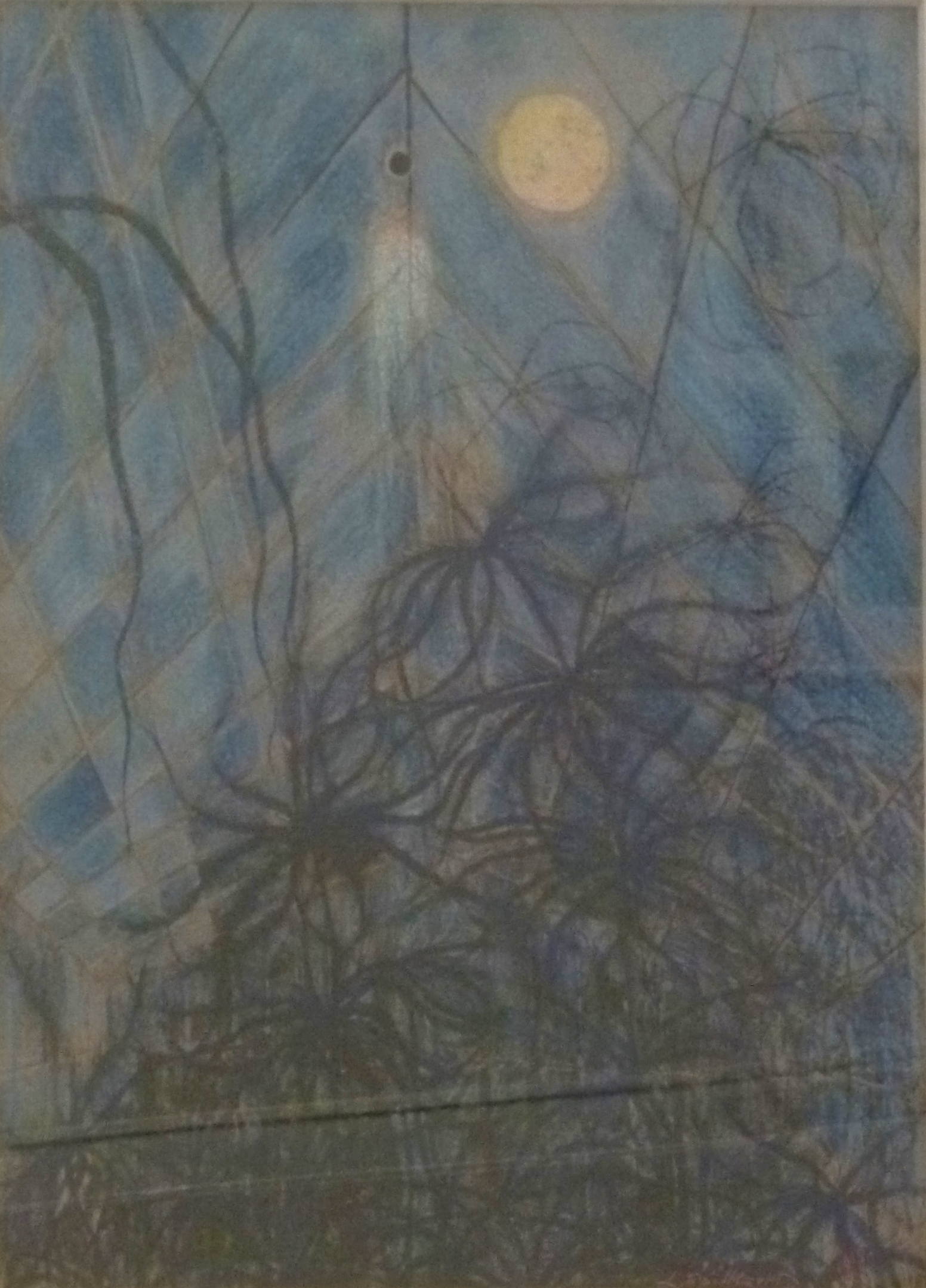 "Serres Chaudes" (1917); Oost-Indische inkt, kleurkrijt op papier, contépotlood (66 x 50 cm) door de Belgische kunstschilder Léon Spilliaert (1881-1946); privéverzameling